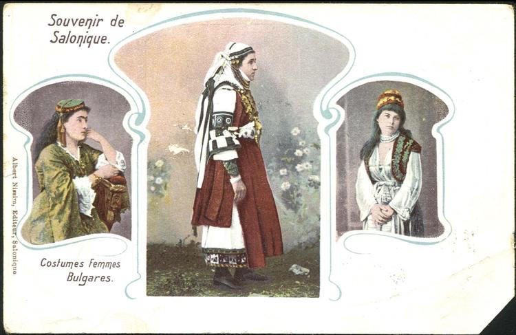 Български носии от Солун.